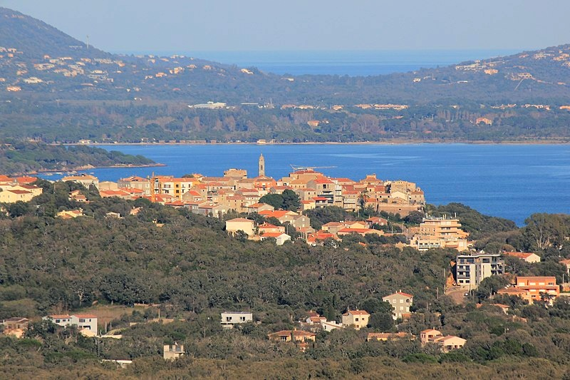 Hornjoserbsce: Blick vom Casteddu di Ceccia nach Porto-Vecchio